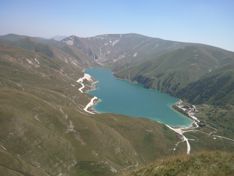 Озеро Кезеной-Ам (Эйзенам), Веденский район This image is related to the protected area of Russia number 2010008